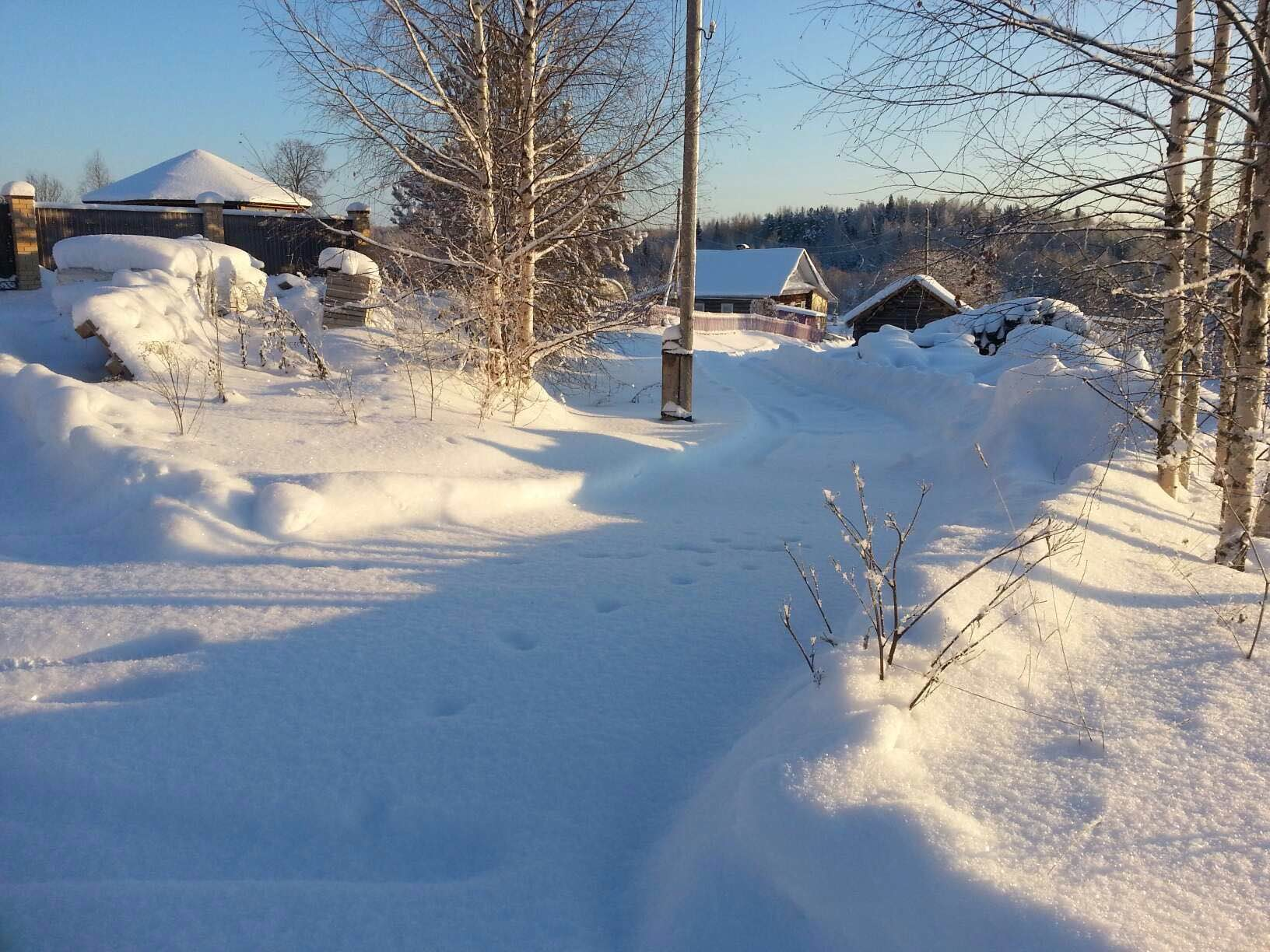 дорога к "Черной" речке через деревню